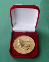 Медаль В. Таїрова: Золота медаль премії імені Василя Єгоровича Таїрова